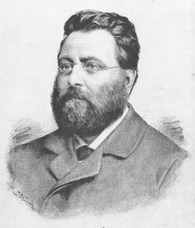 Portrét, nakreslený Janem Vilímkem pro Humoristické listy